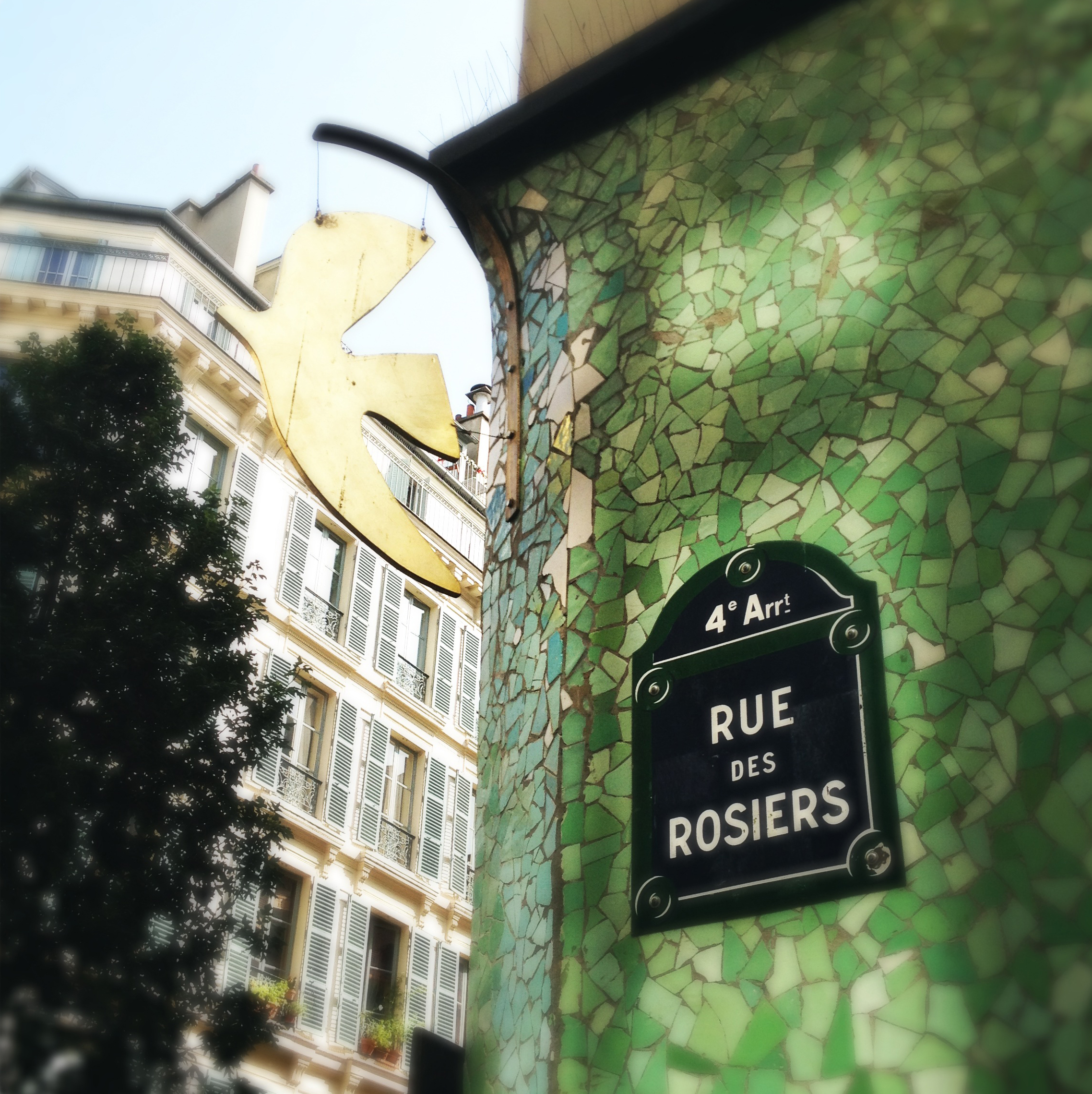 Rue des Rosiers (Paris)